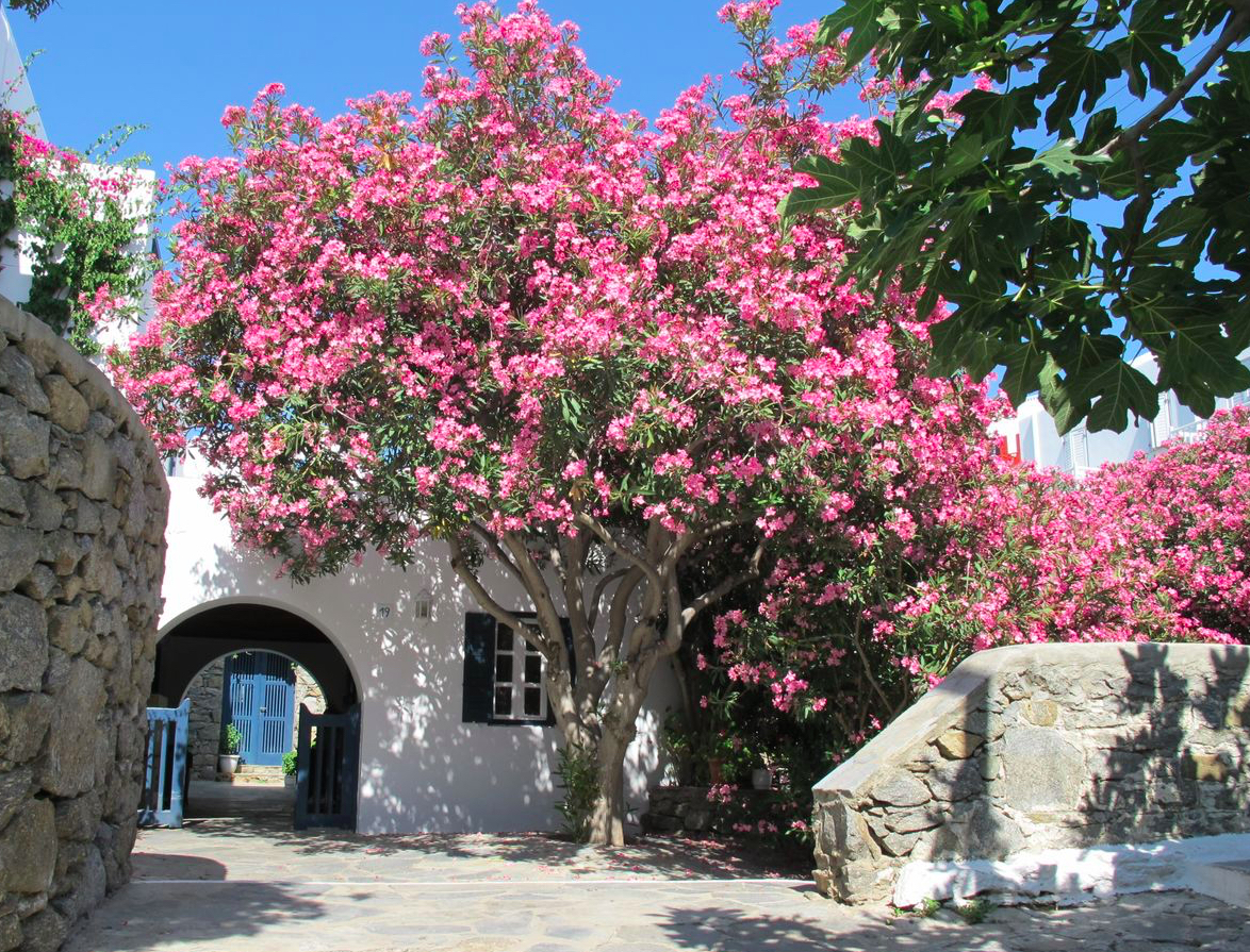 Laurier-rose taillé en arbre. Grèce.